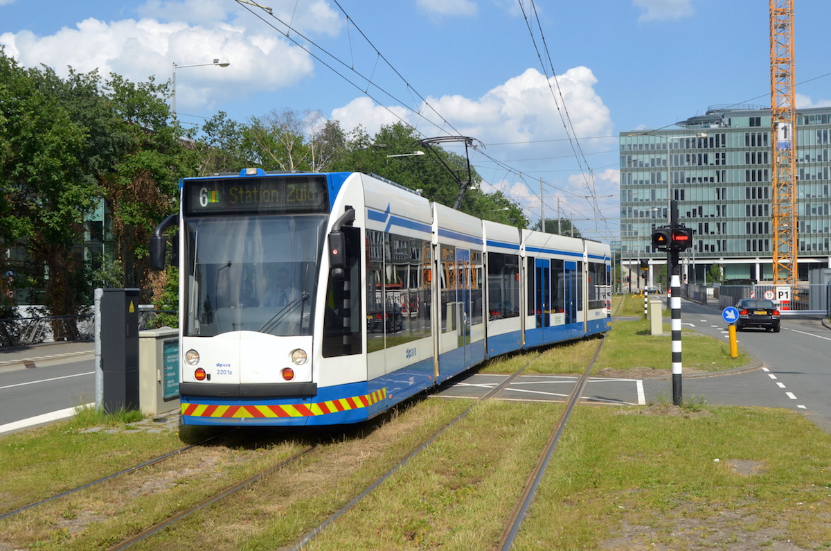 Spitsdienst lijn 6 (Station Zuid - Amstelveen Stadshart) op de Strawinskilaan. Foto: Erik Swierstra.